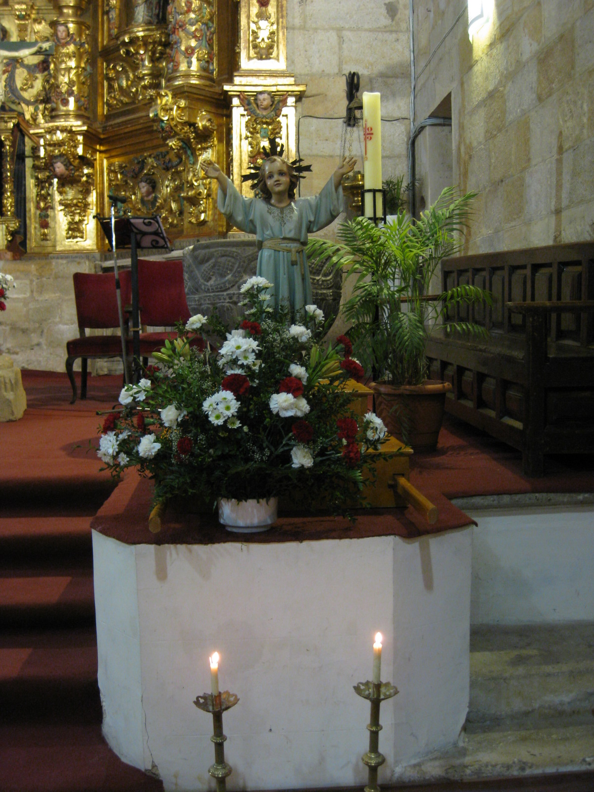 Imagen del Dulce nombre de Jesús, una de las cofradías de Canicosa de la Sierra (Burgos, España).